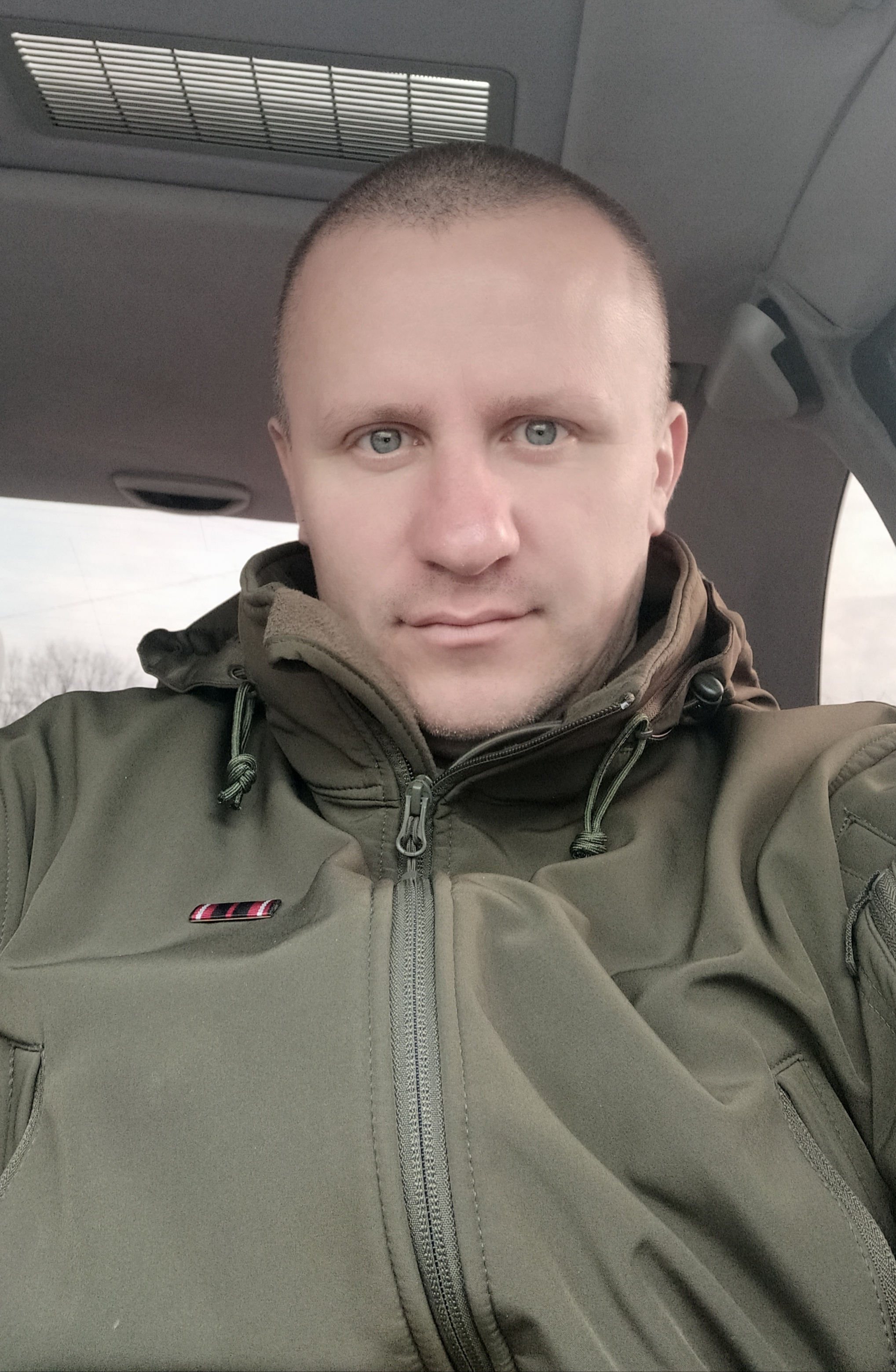 Владислав Попович